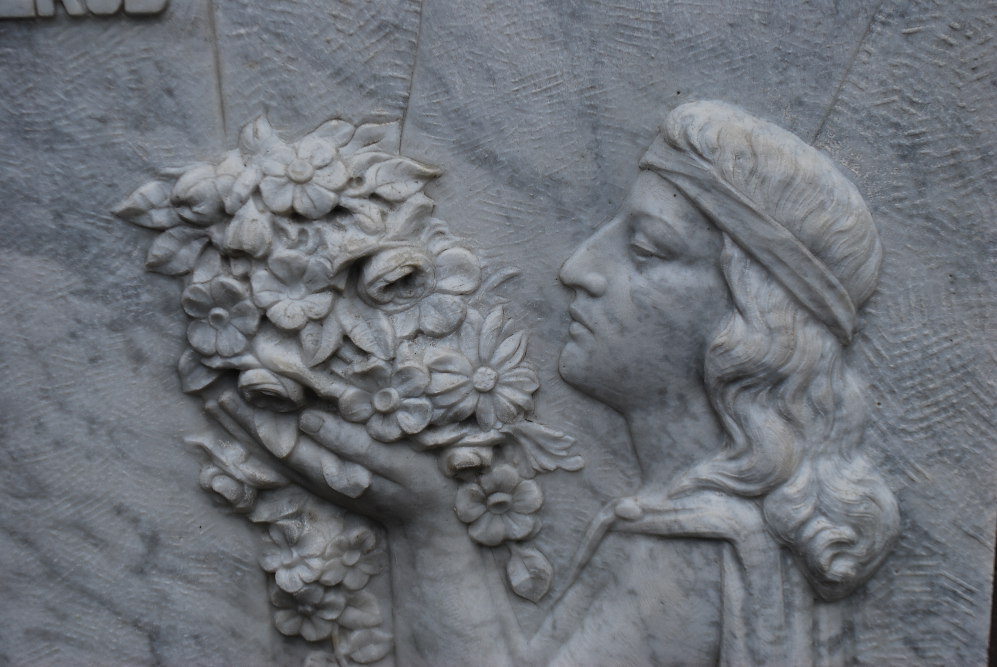 Vue du marché dominical de la Batte, sur les quais de la Meuse à Liège.